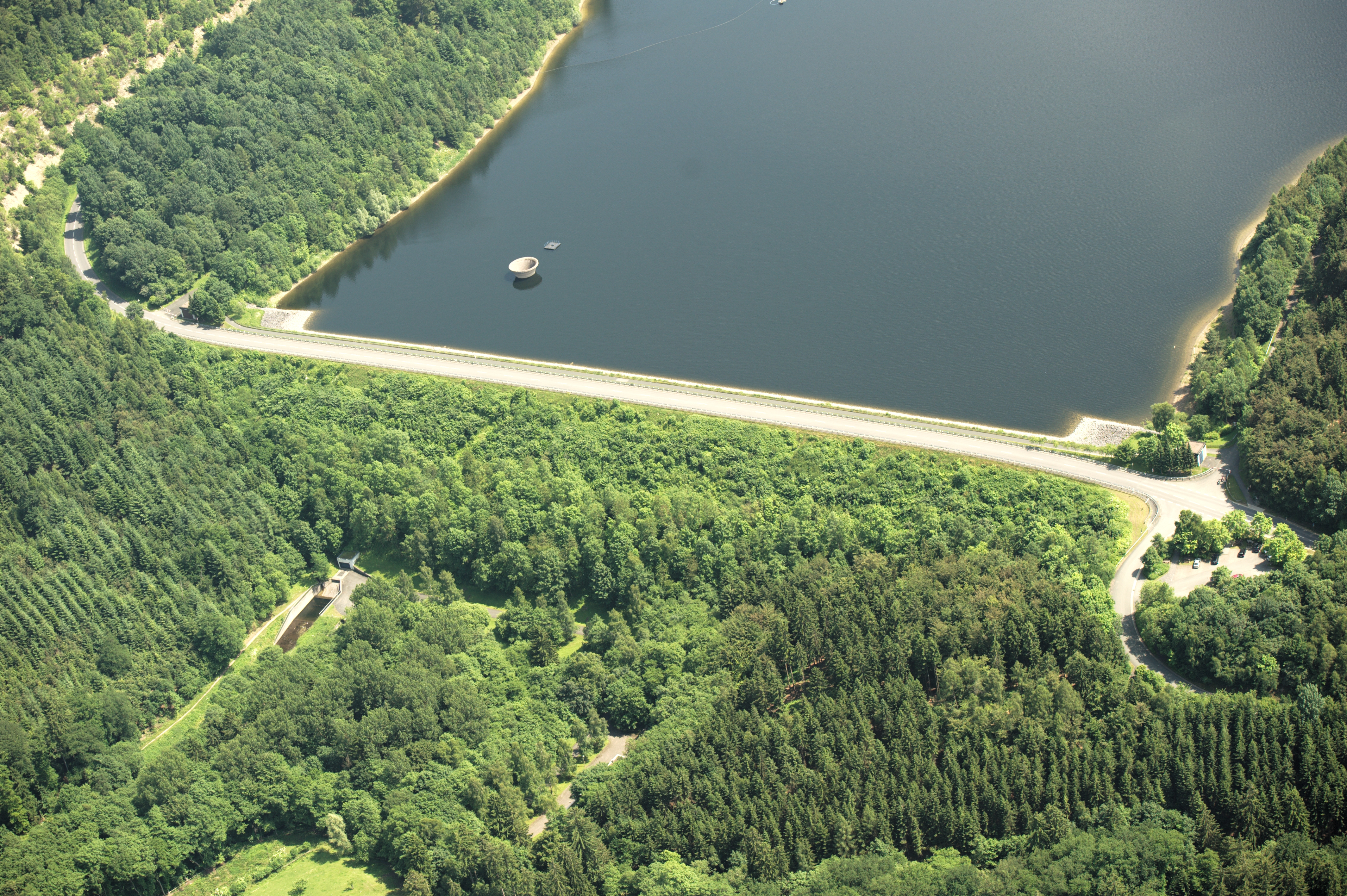 Luftaufnahme Aabachsee, Bad Wünnenberg, Kreis Paderborn (im Rahmen des Fotoflugs Sauerland-Ost) The making of this document was supported by the Community-Budget of Wikimedia Germany.